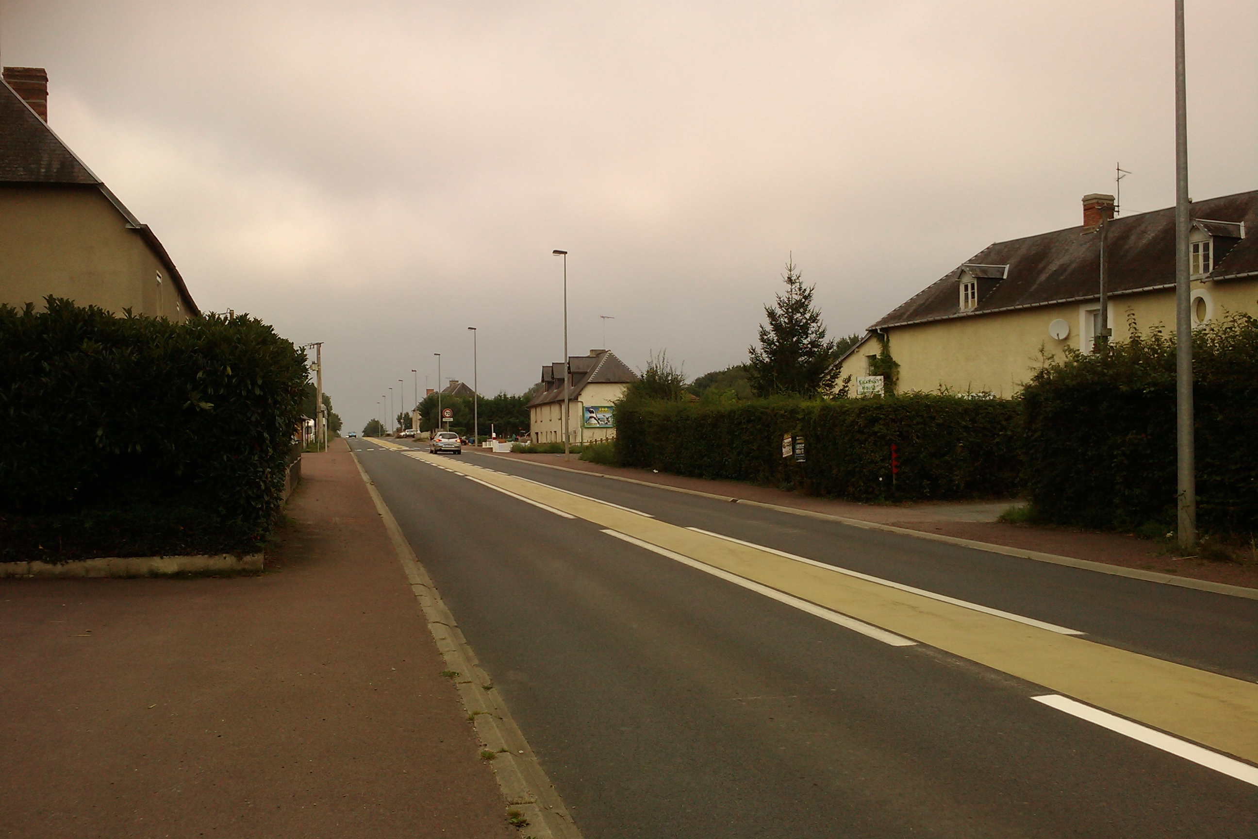 La départemental D900 traverse le Mesnil-Eury